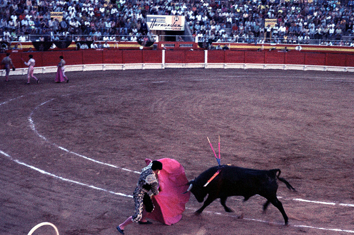 Bullfight Spain, Palma de Mallorca, Summer 1970 - Corrida en España, Palma de Mallorca, verano 1970 - Stierkampf in Spanien, Palma de Mallorca, Sommer 1970